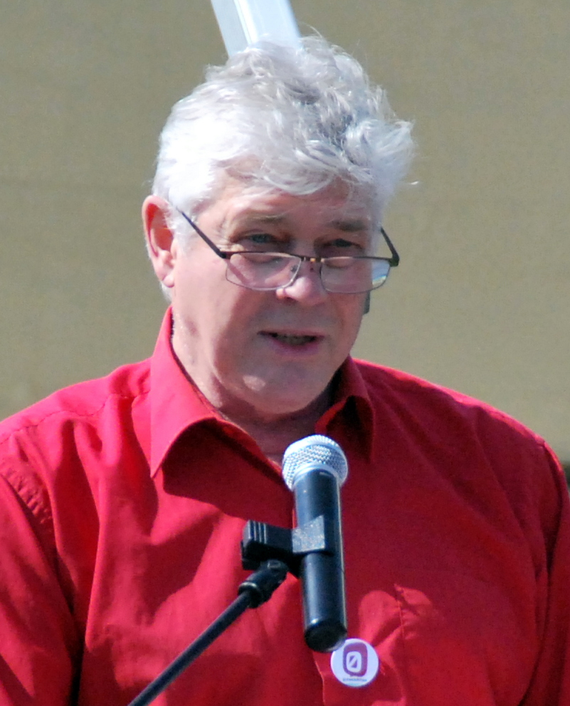 Folketingsmedlem Lars Dohn fra Enhedslisten. Her under en tale ved Arbejdernes internationale kampdag i Viborg.